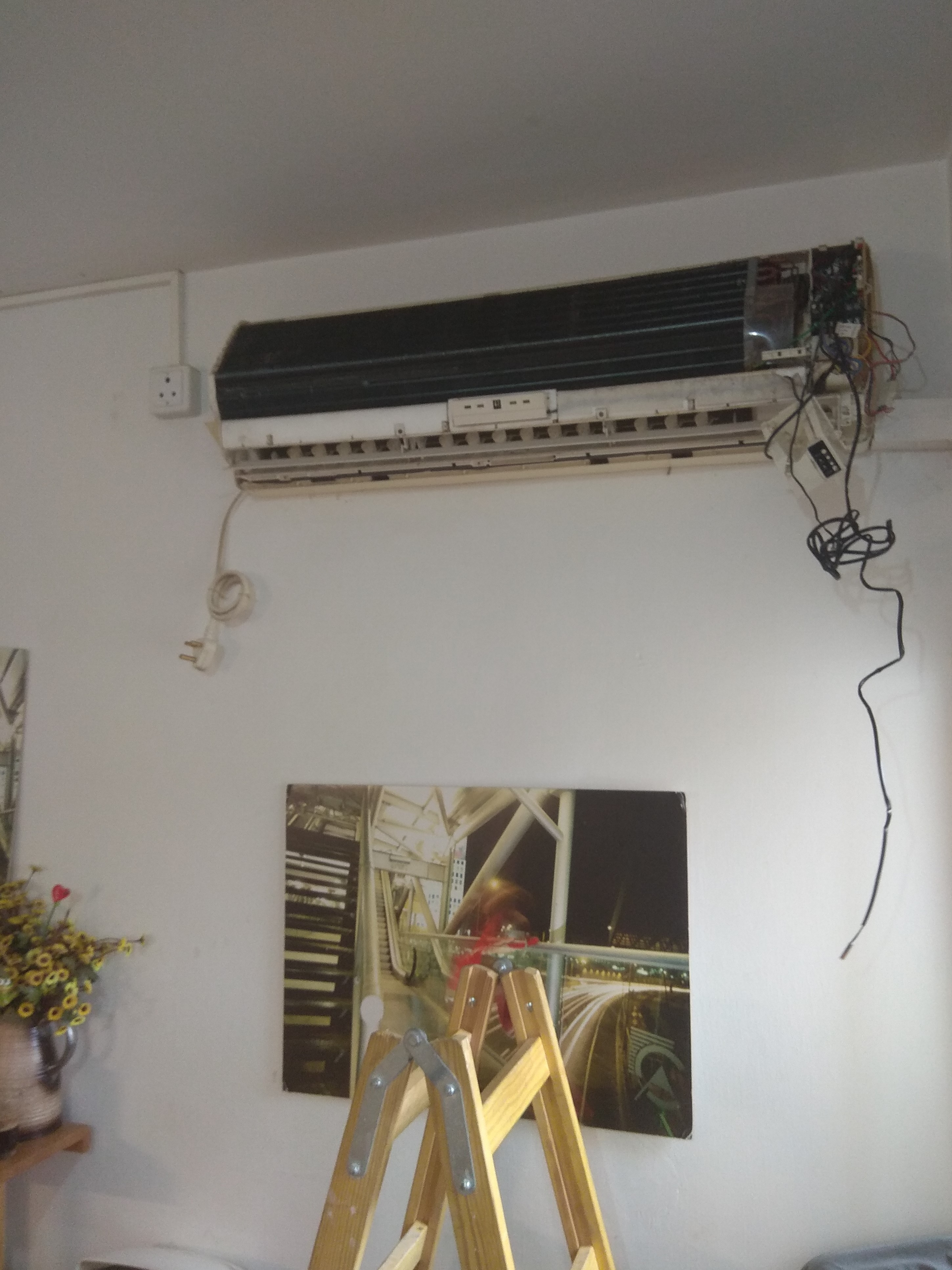 מזגן בעת תיקונו